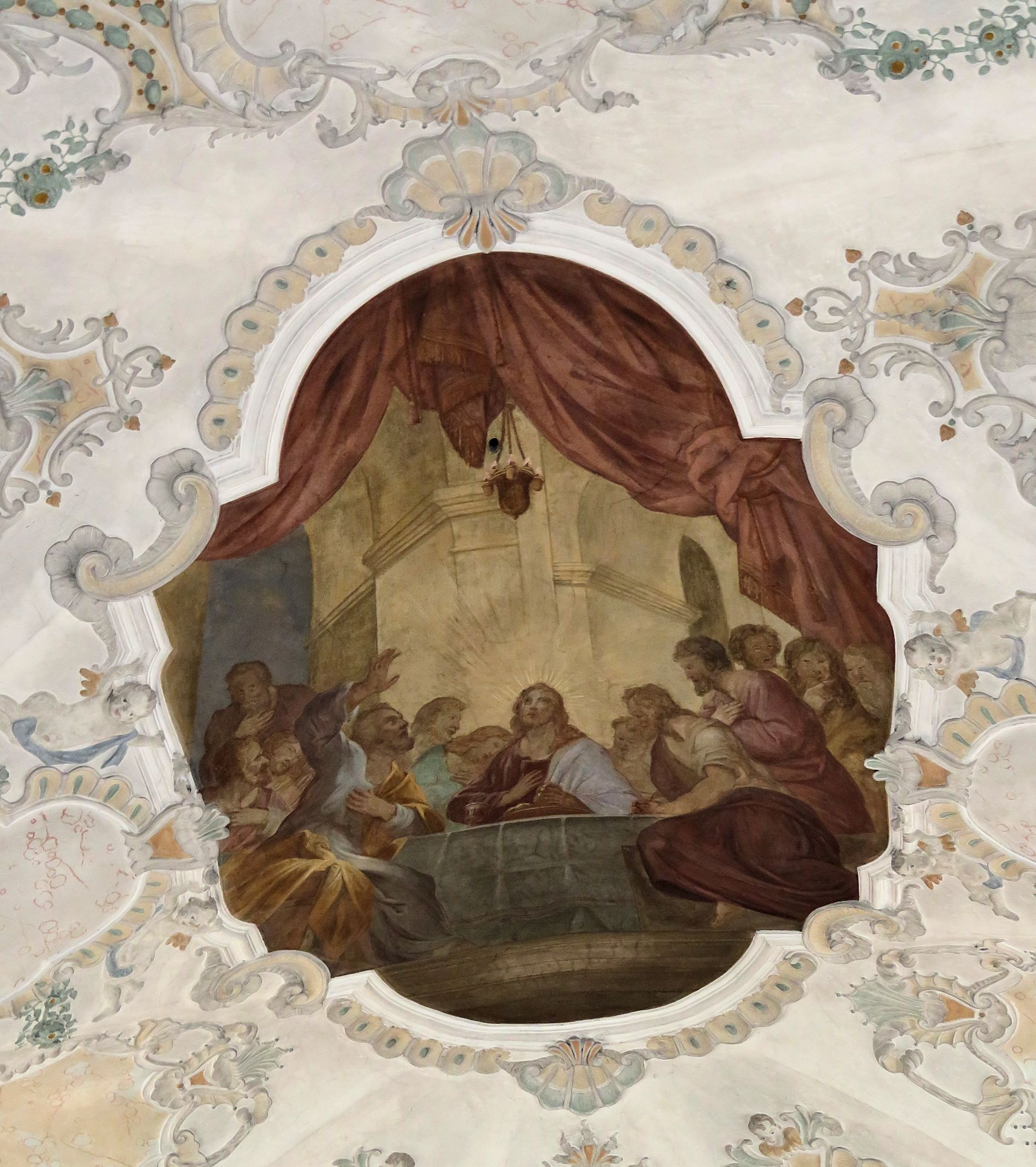 St. Peter und Paul in Hopfen am See ist eine barockisierte Kirche, deren Ursprünge wohl auf das 11. Jh. zurückgehen. Sie enthält gotische Fresken und Malereien von Claudius Schraudolph dem Älteren sowie Stuck von Joseph Fischer aus Faulenbach.